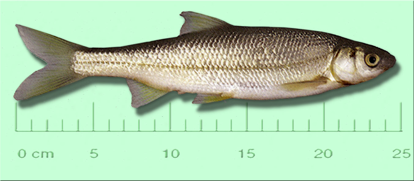 Toxostome (Chondrostoma toxostoma), poisson trouvé dans le nord-est de l'Espagne et le sud de la France ; dans les bassins versants de l'Èbre, du Rhône, de l'Adour, de la Garonne et de la Dordogne